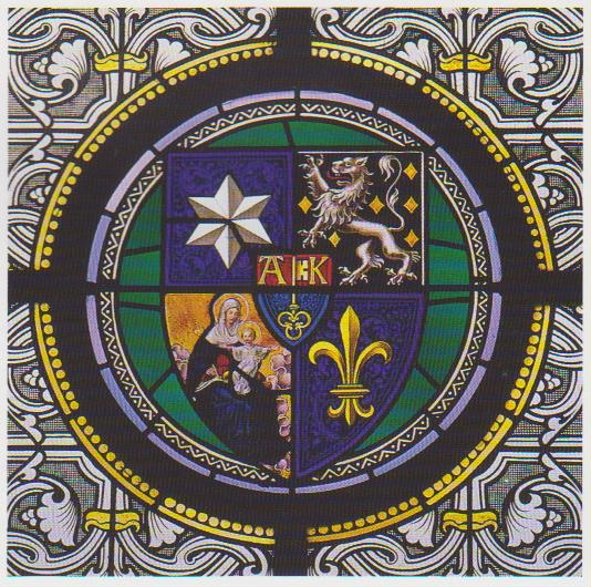 Vierteiliges Kompositwappen der Abtei Mariastern (Gwiggen), Hohenweiler, Vorarlberg, Austria; lo: Symbol Mariastern, ro: Löwe für Feldbach, lu: Maria m Kind für Kalchrain, ru: Lilie für Tänikon. Offizieller Titel seit 1869: Konvent der vereinigten thurgauischen Abteien Kalchrain, Feldbach und Tänikon in Mariastern.